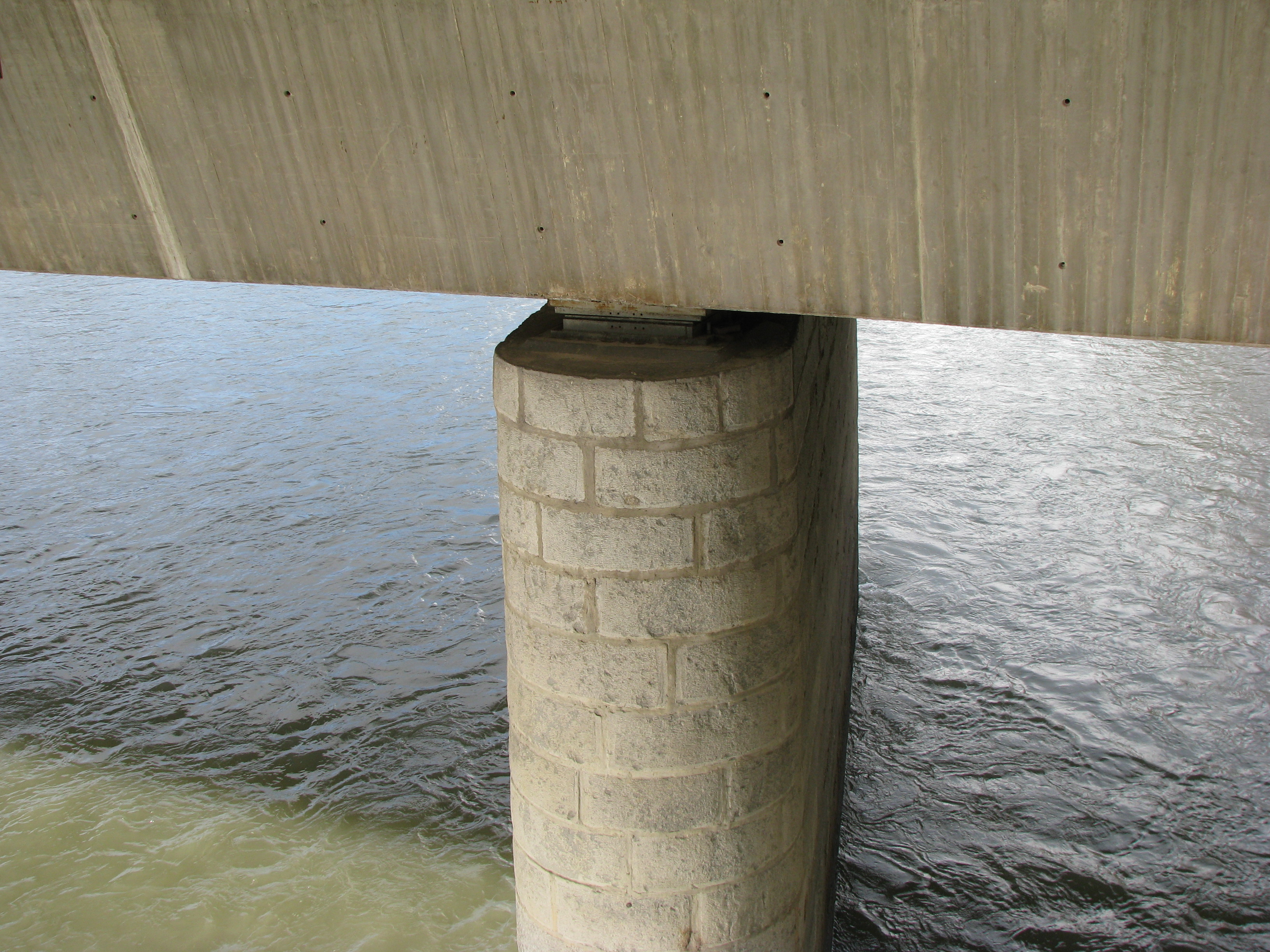 Innsbruck, Grenobler Brücke, Blick von der Fußgängerbrücke auf das Tragwerk der Grenobler Brücke